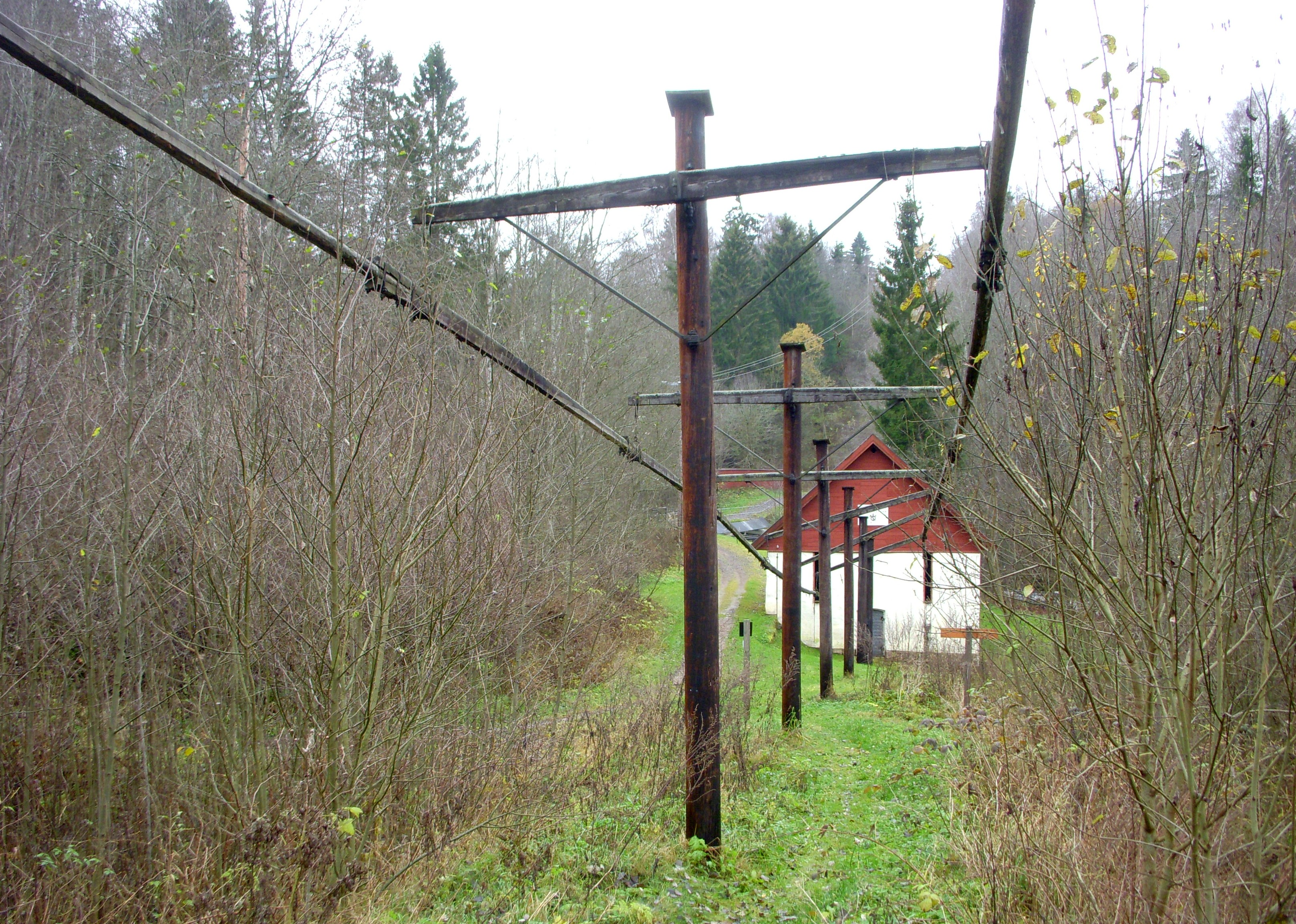 Konstgången vid Sördalens konsthjul